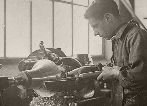 Repoussage à l'usine Orfèvrerie Liberty